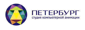 Логотип студии